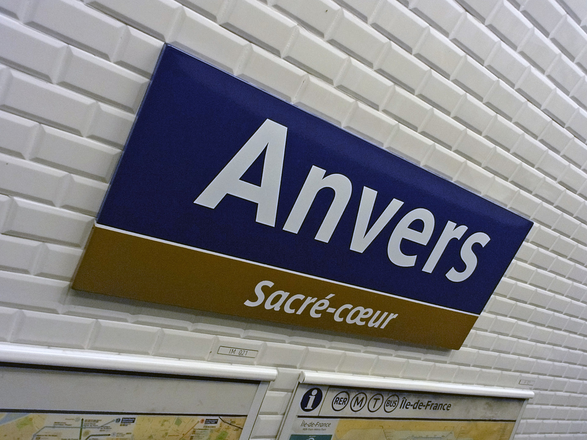 Station Anvers de la ligne 2 du métro de Paris, France.